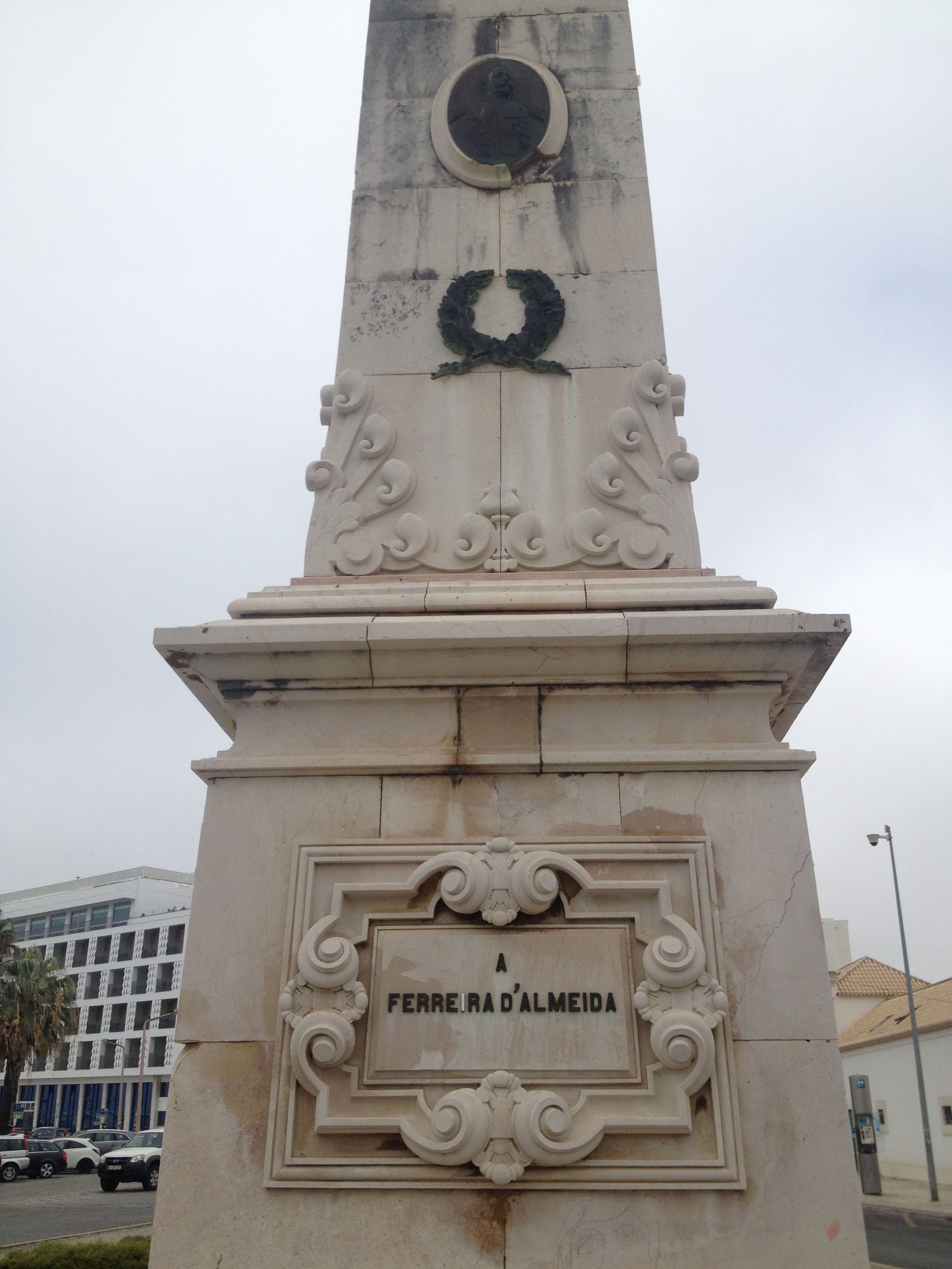 Faro, Portugal.